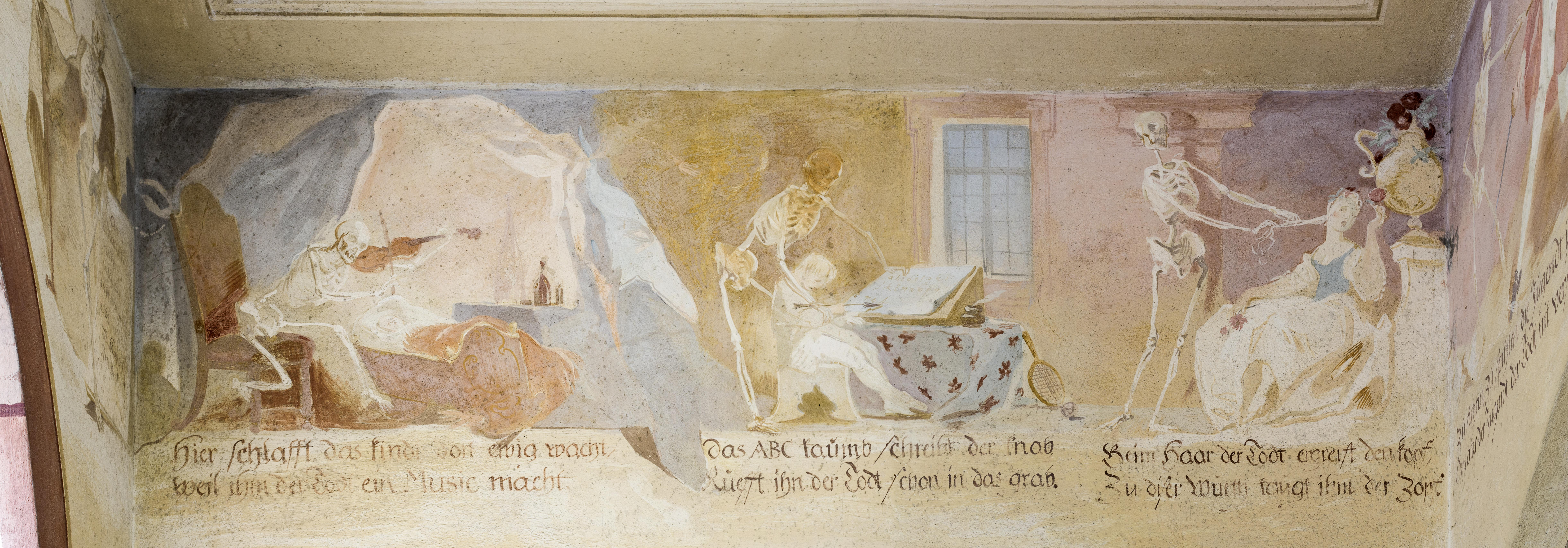 Der Totentanz in der Michaelskapelle auf dem Alten Friedhof in Freiburg im Breisgau nach der Restaurierung 2012 die Linke Seite